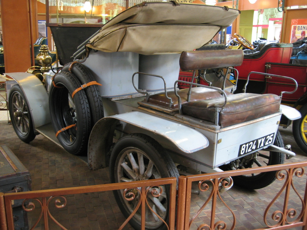 Peugeot Type 91 de 1908 - Musée Peugeot Sochaux